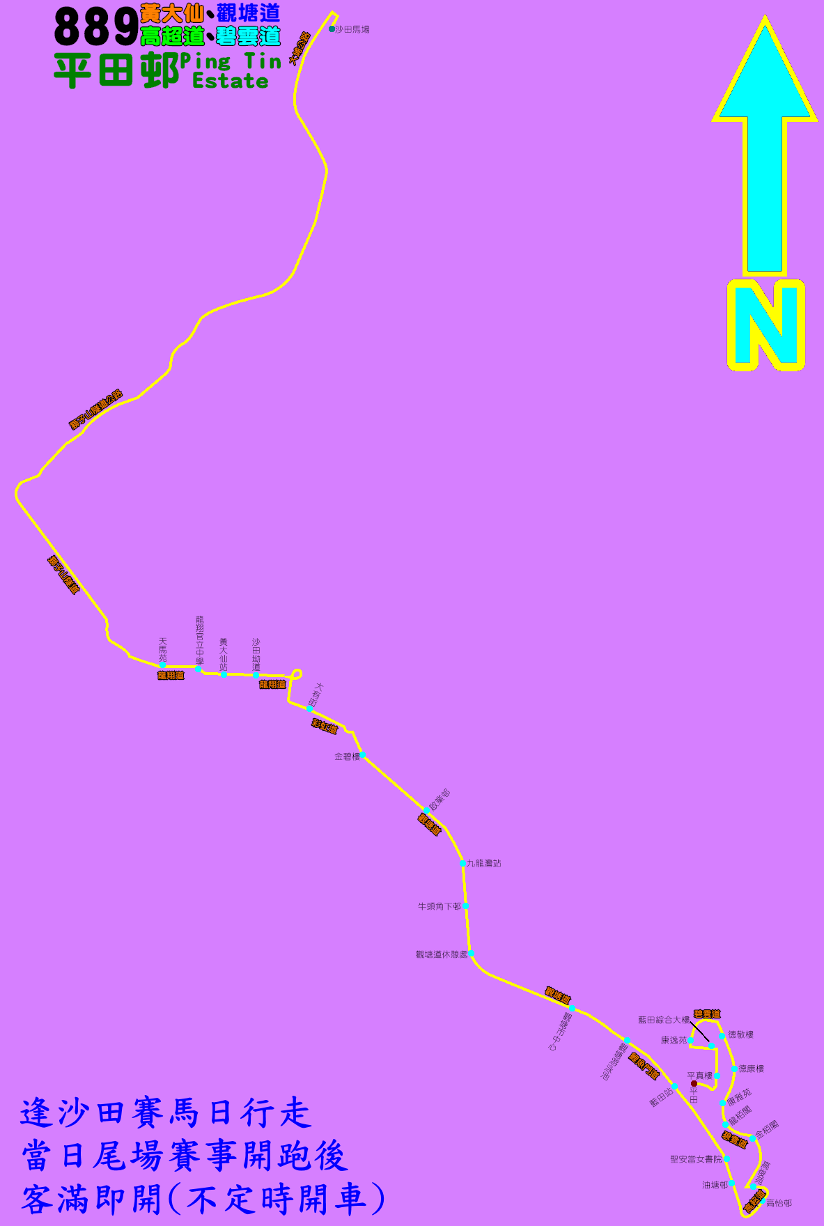 中文（香港）: 馬場巴士889線的走線圖